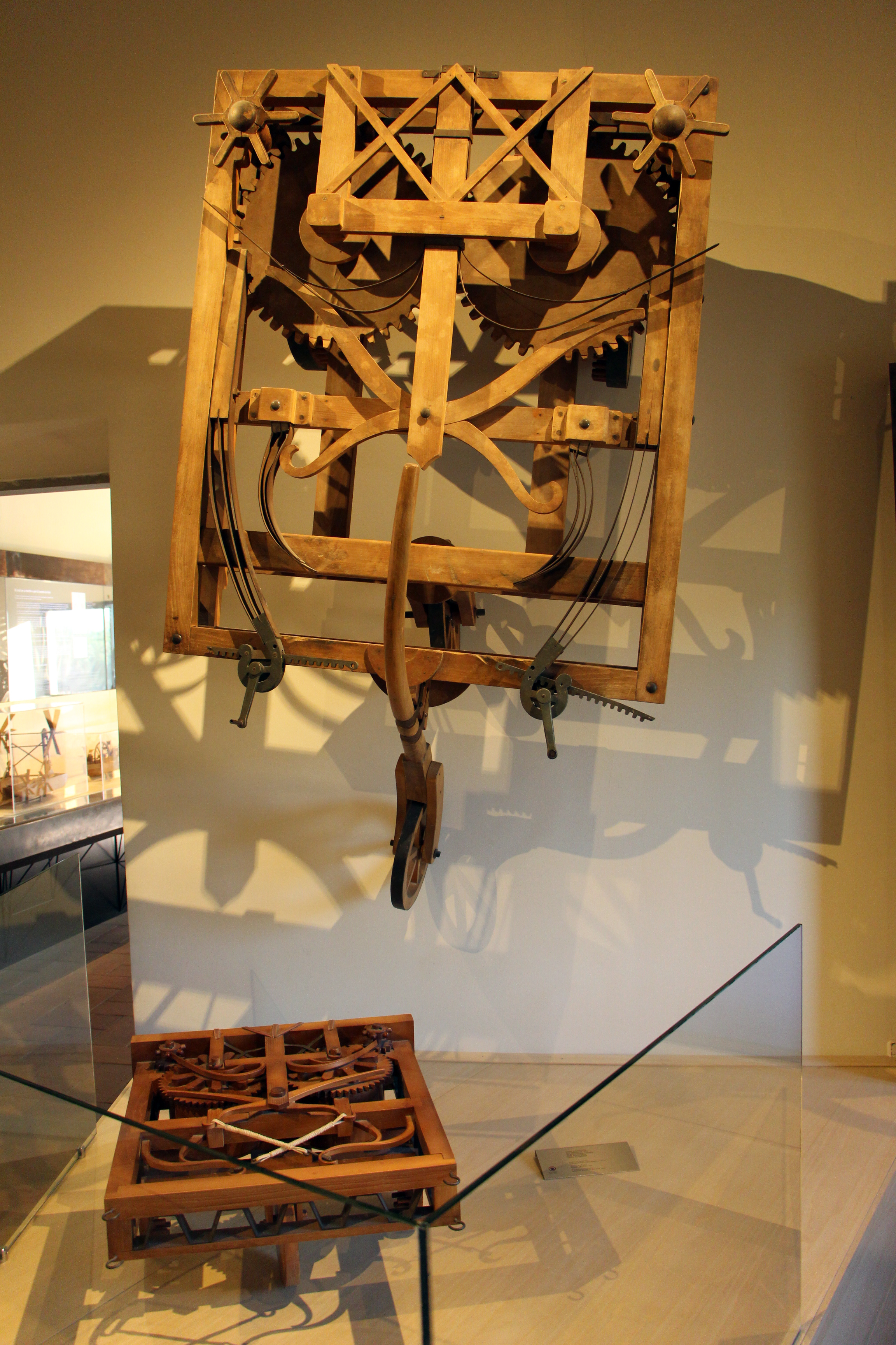 Museo Leonardiano (Vinci)